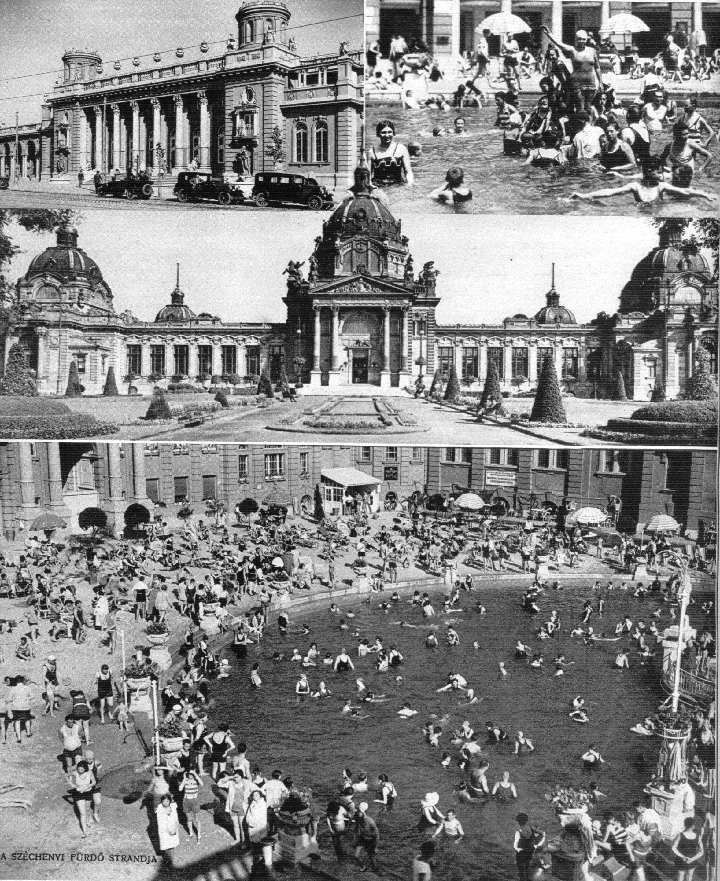 A Városligeti Széchenyi fürdő